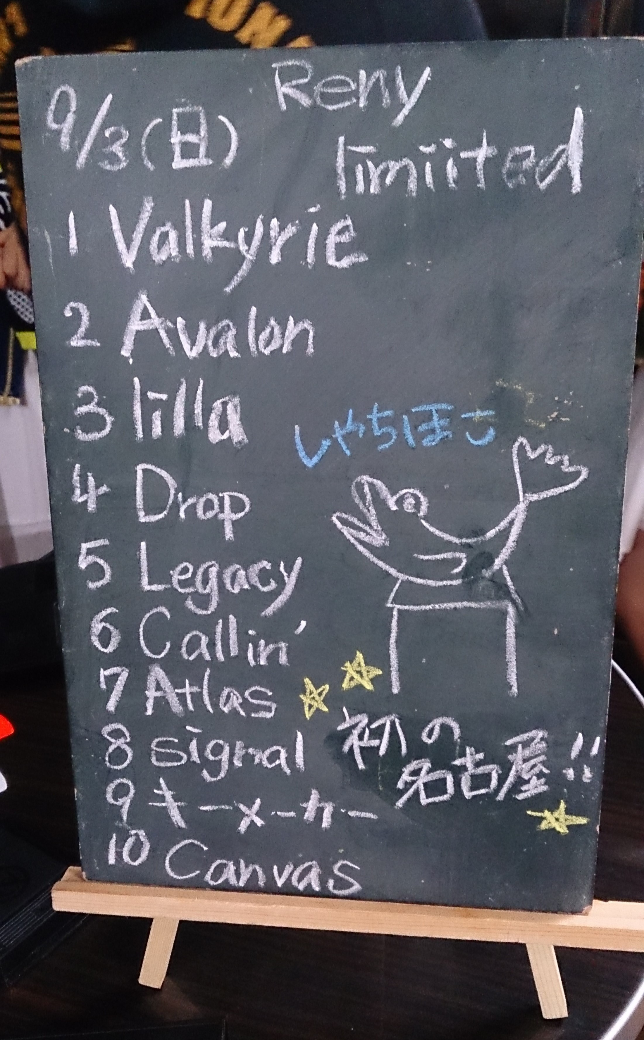 amiinAセトリボード(20170903(1))